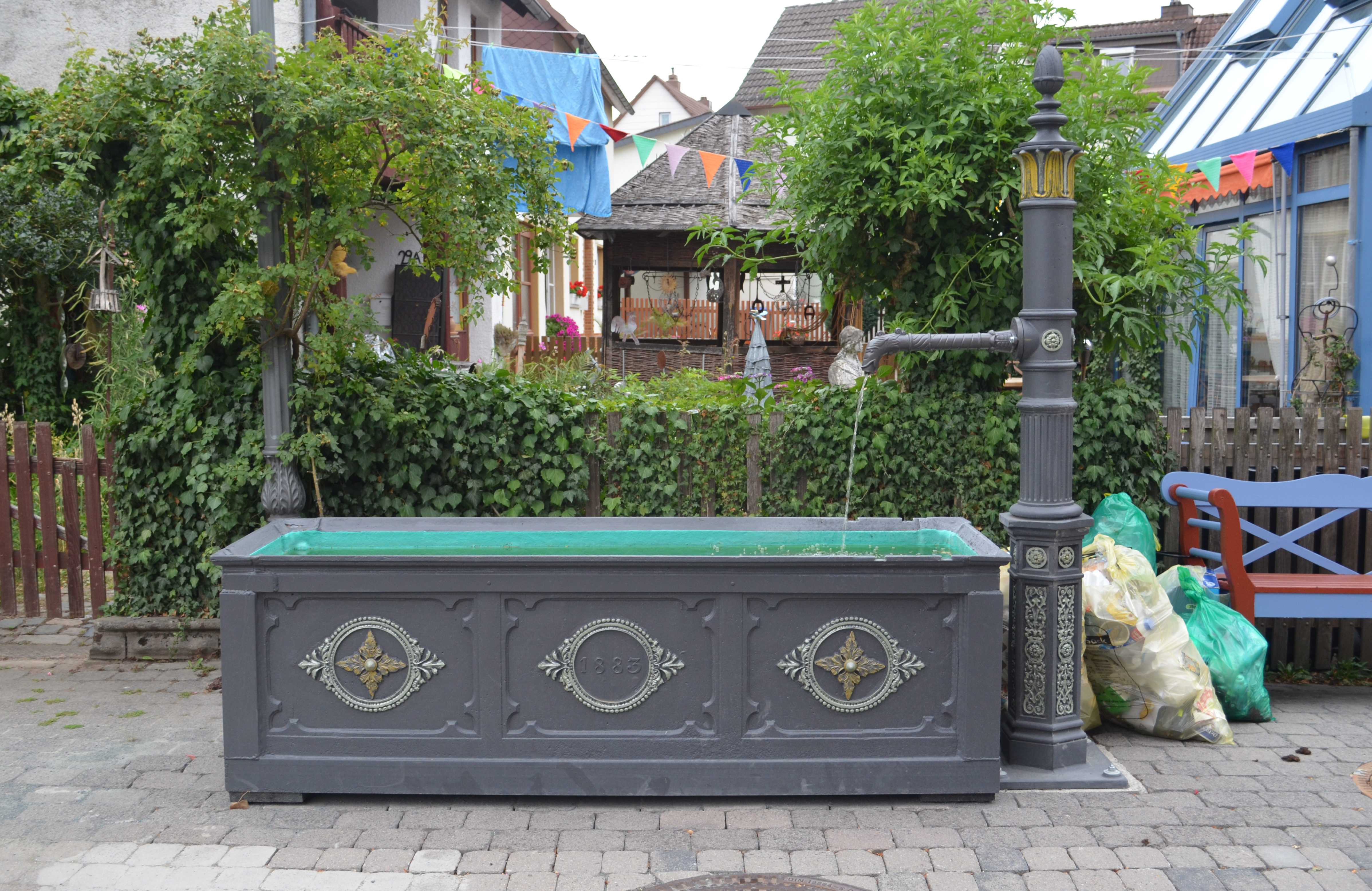 Wehrheim, Brunnen vor dem Stadttor